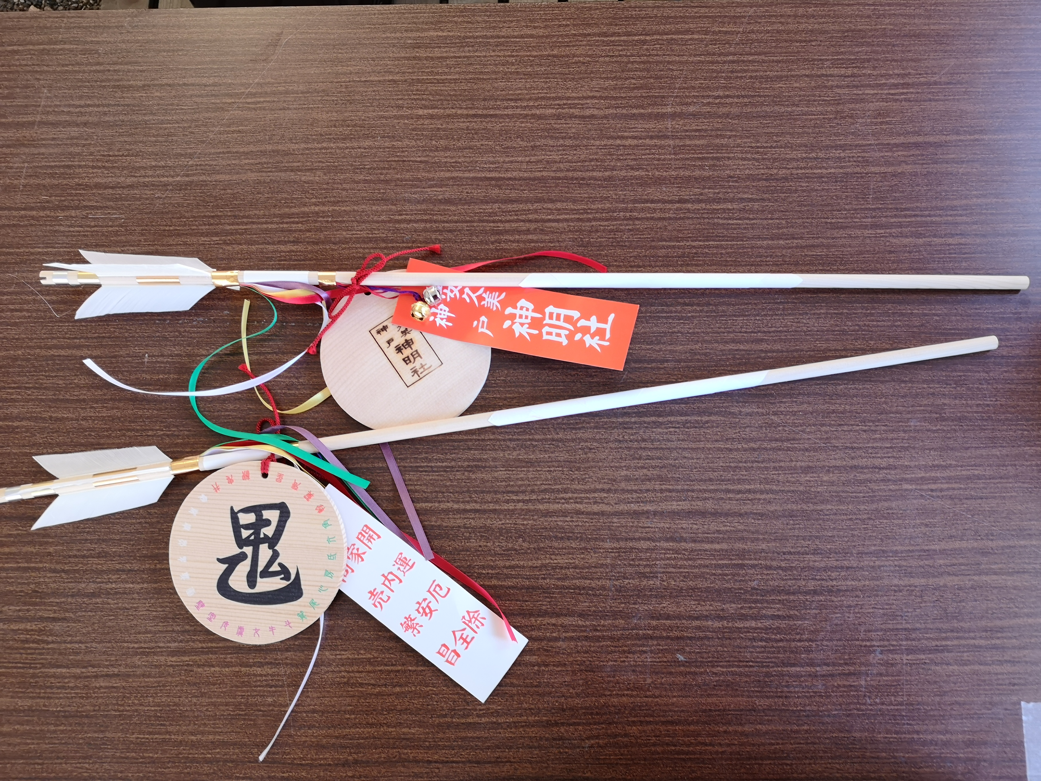 愛知県豊橋市の安久美神戸神明社の例祭「鬼祭」で売られる破魔矢